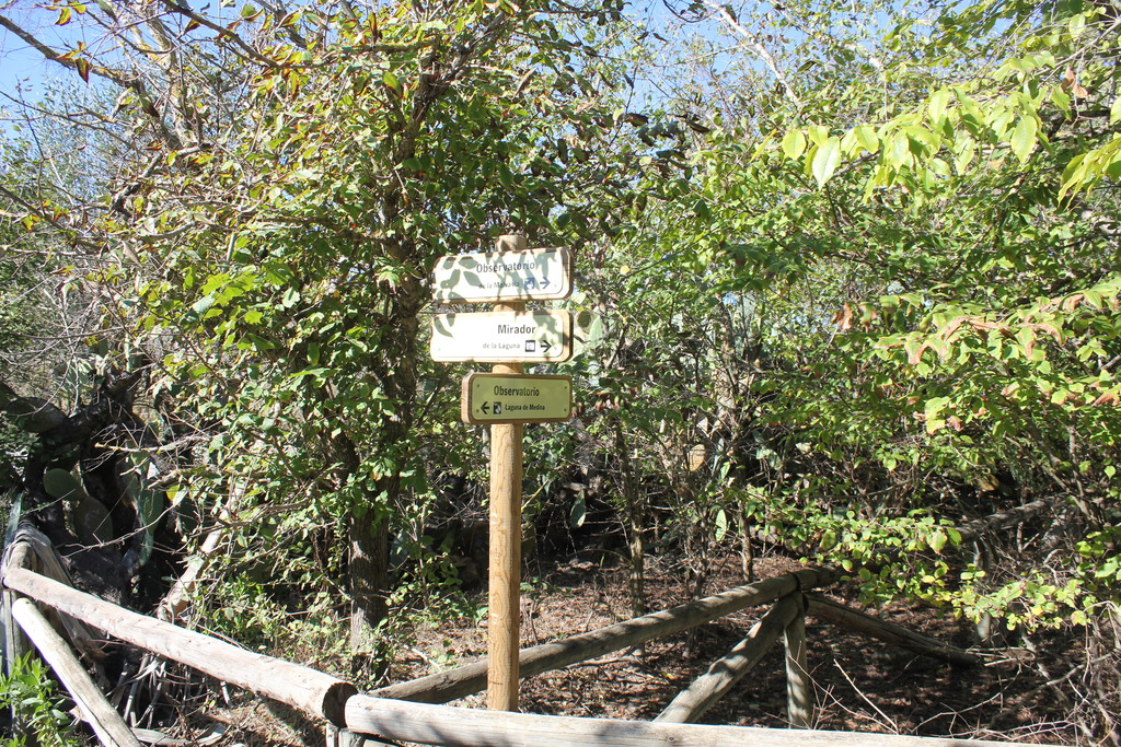 Laguna de Medina, Jerez de la Frontera (Andalucía, España)